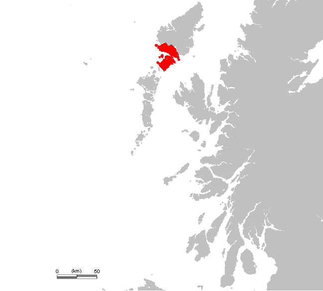 Description: Carte de localisation de l'île de Harris en Ecosse Auteur: Rémih date: 11/07/06